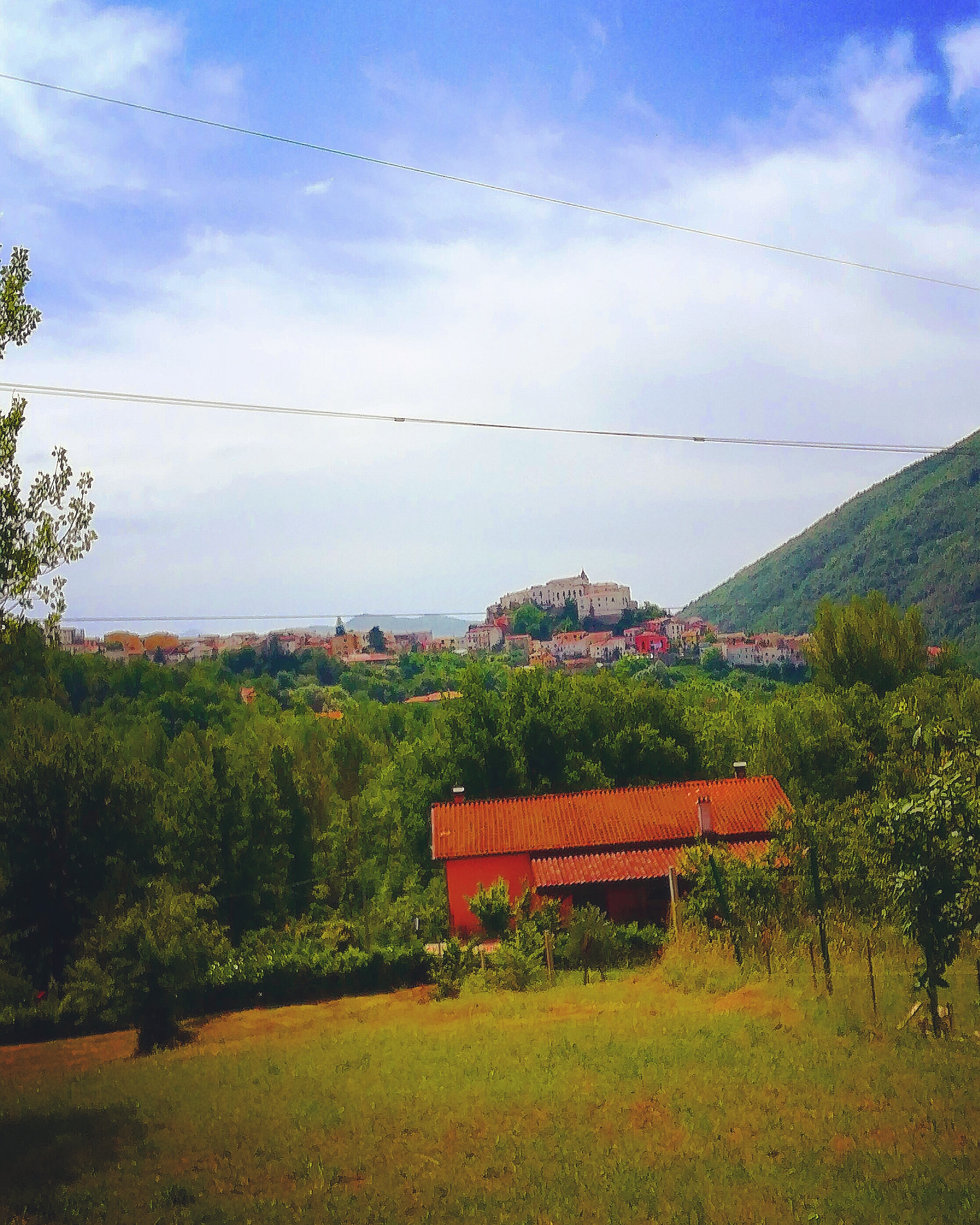 Colli visto da Pescorosso